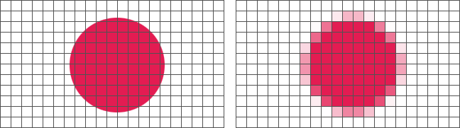 Způsob zpracování obrázku v bitmapové grafice.